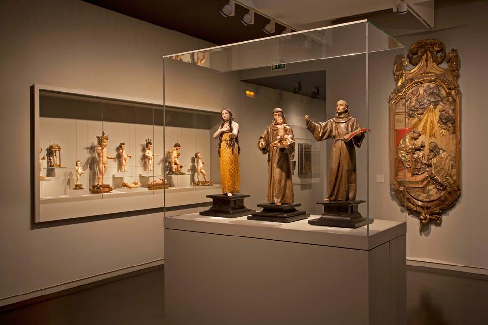 Sala d'escultura del barroco. Museu Frederic Marès